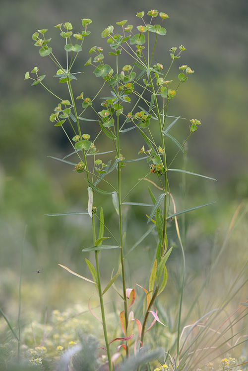 Молочай жигулёвский